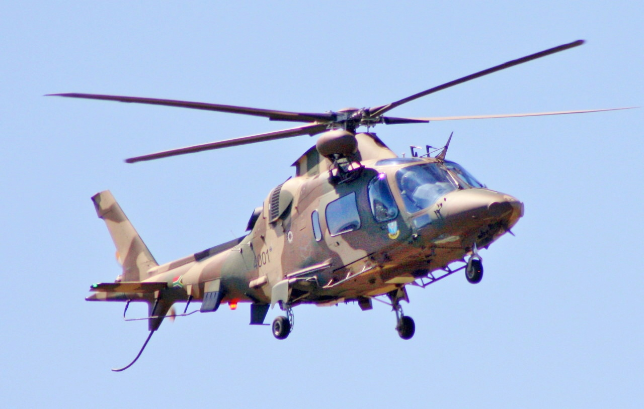 SAAF Agusta A109 4001